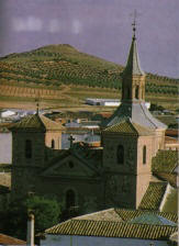 Convento de la Merced en Herencia C-Real